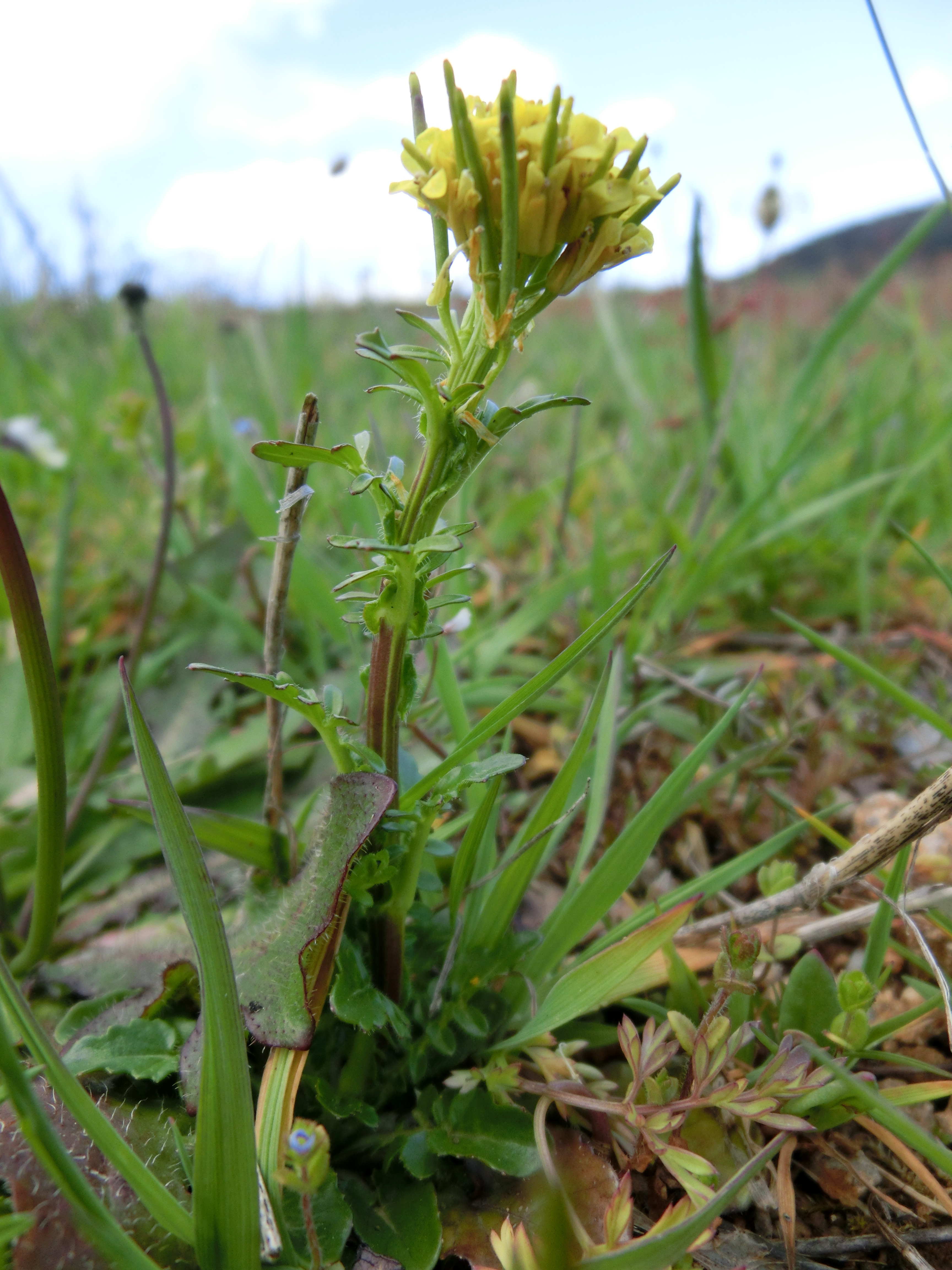 Barbarée intermédiaire